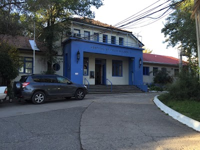 Frontis antiguo Hospital Félix Bulnes de Quinta Normal.